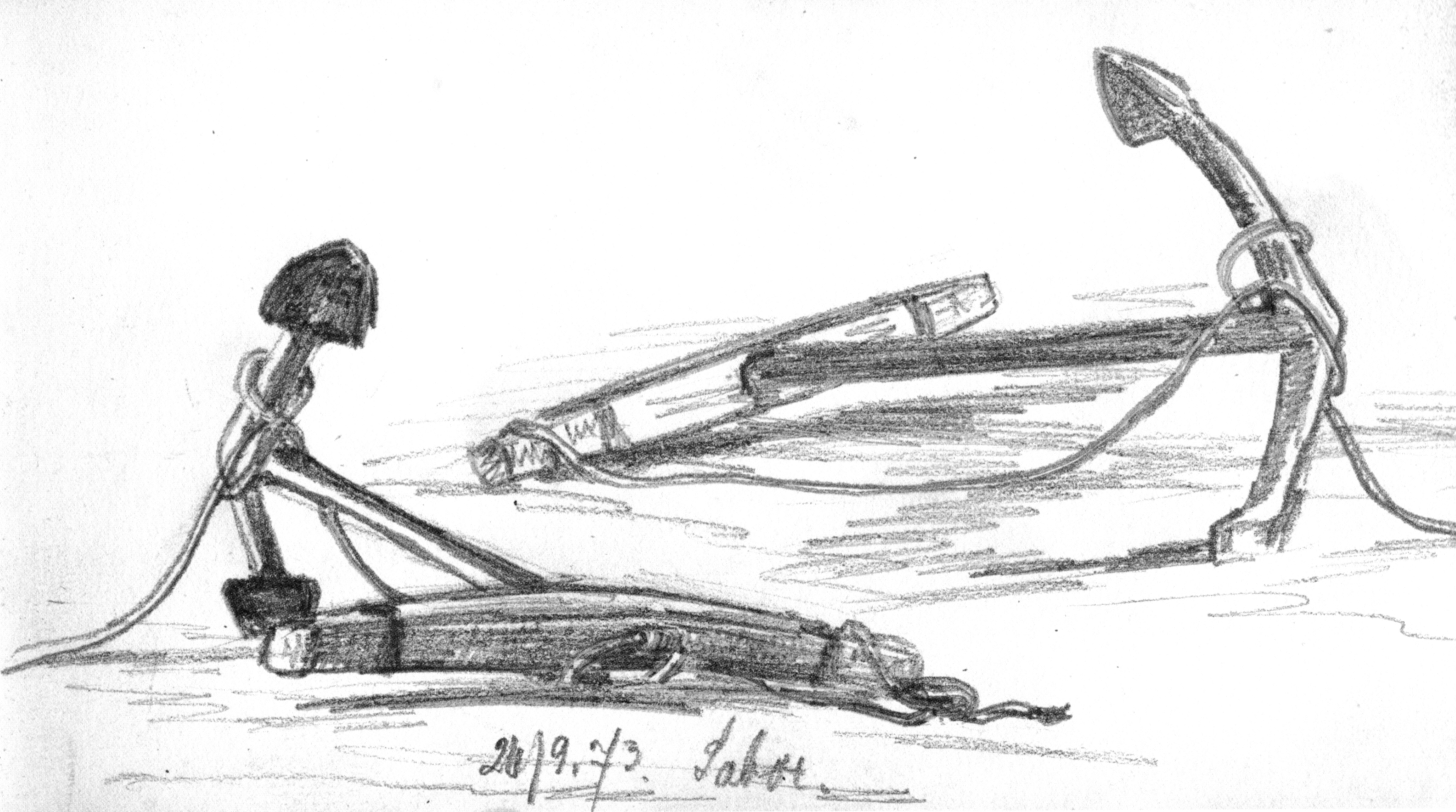 Anker am Strand von Laboe, Zeichnung von Fritz Stoltenberg